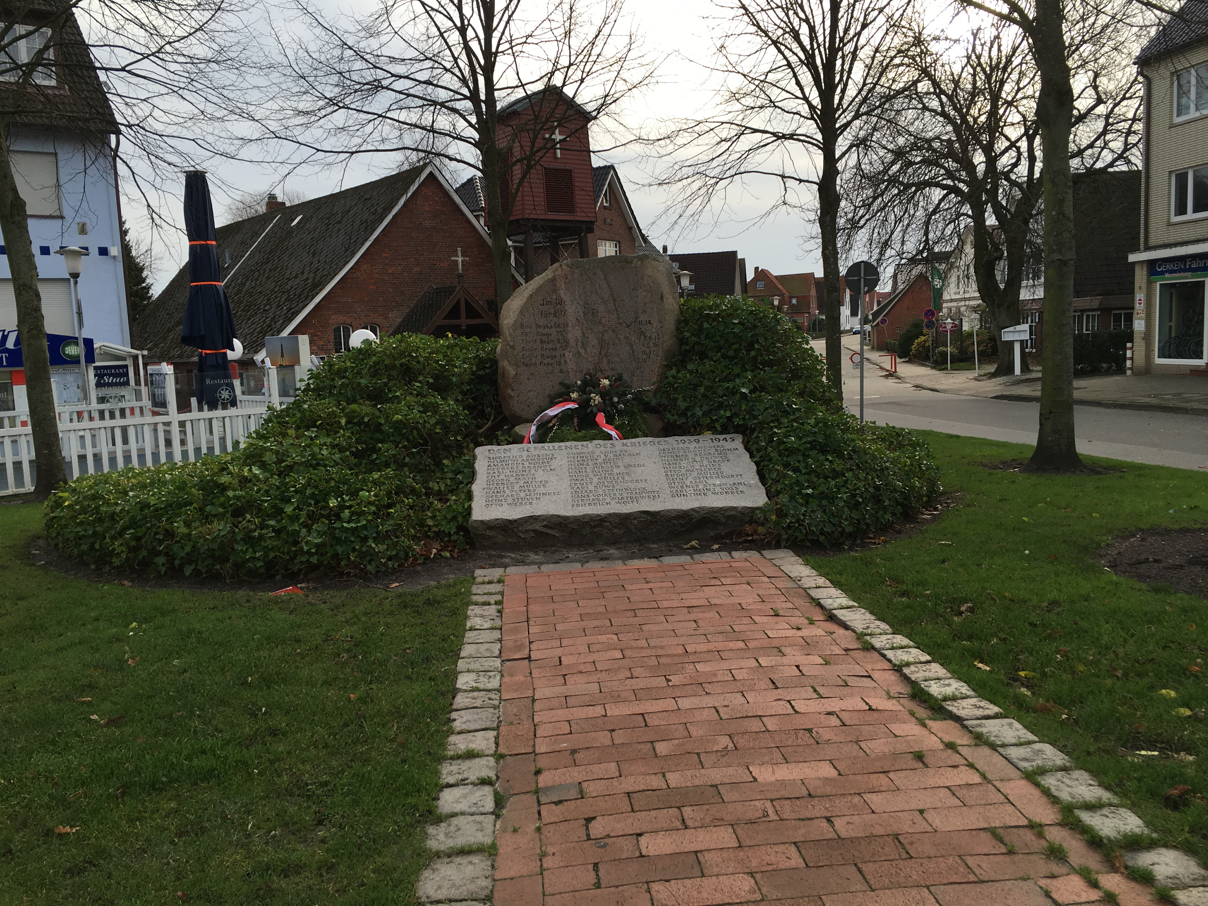 Kriegerdenkmaal in Duhnen (Cuxhoben)